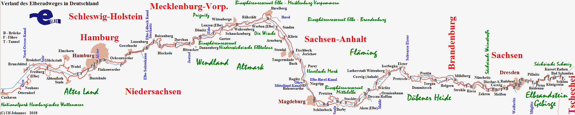 Elberadweg in Germany